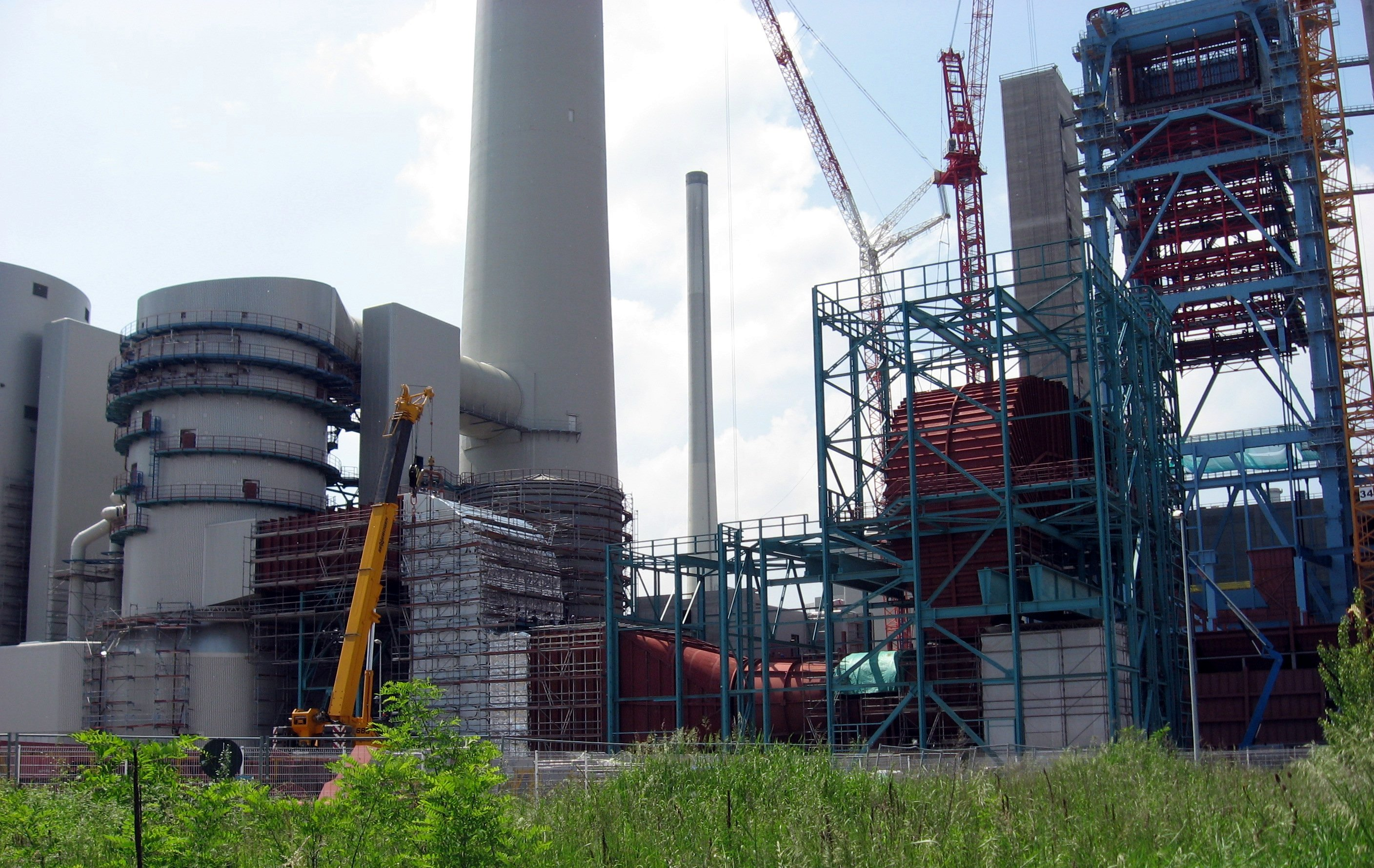 Baustelle des Neubau Block 8 des Rheinhafen-Dampfkraftwerk Karlsruhe.